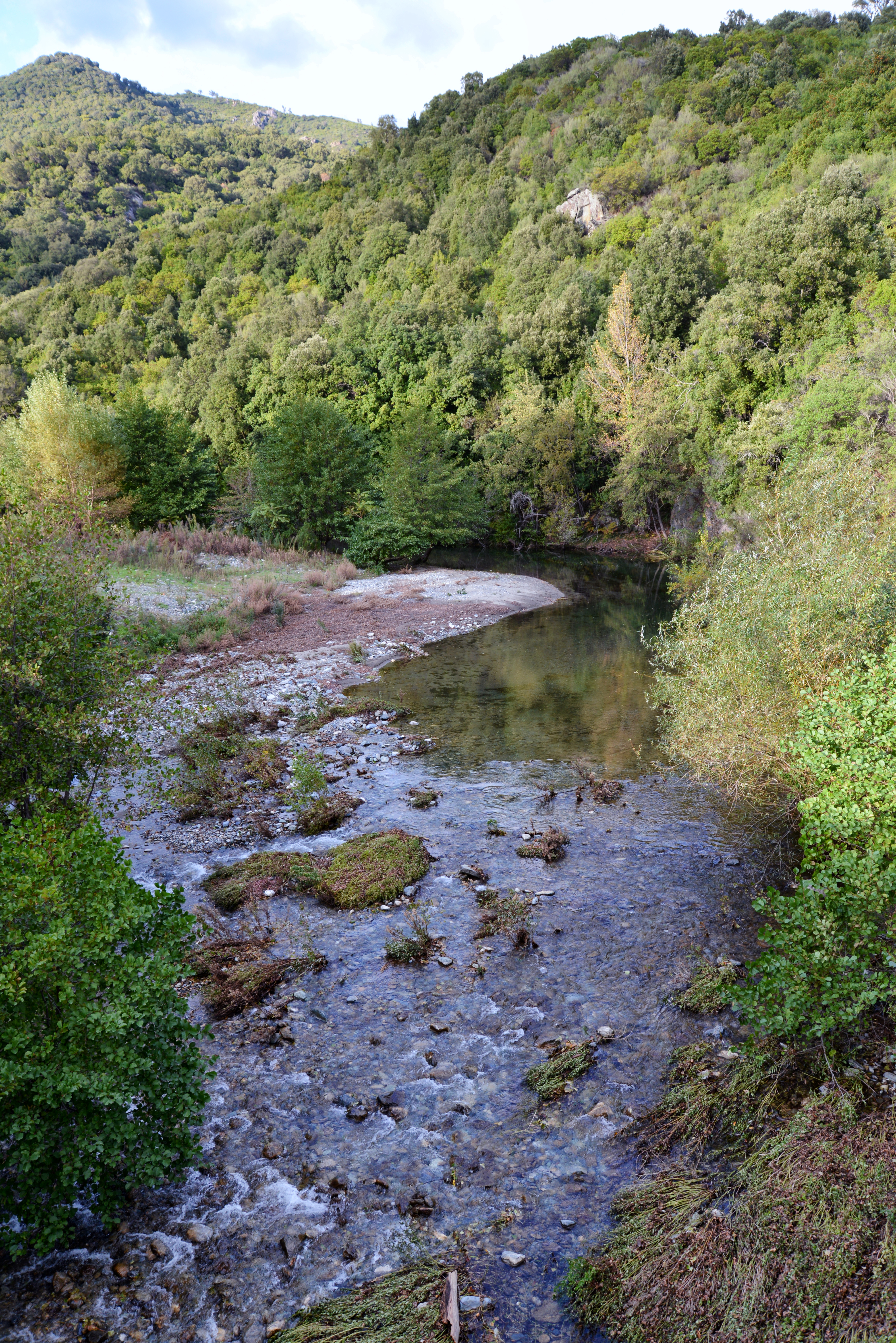 La Bravona à l'ancien moulin de Granajo, en amont du pont de la RD 16 « à cheval » sur Tallone et Tox (Corse).